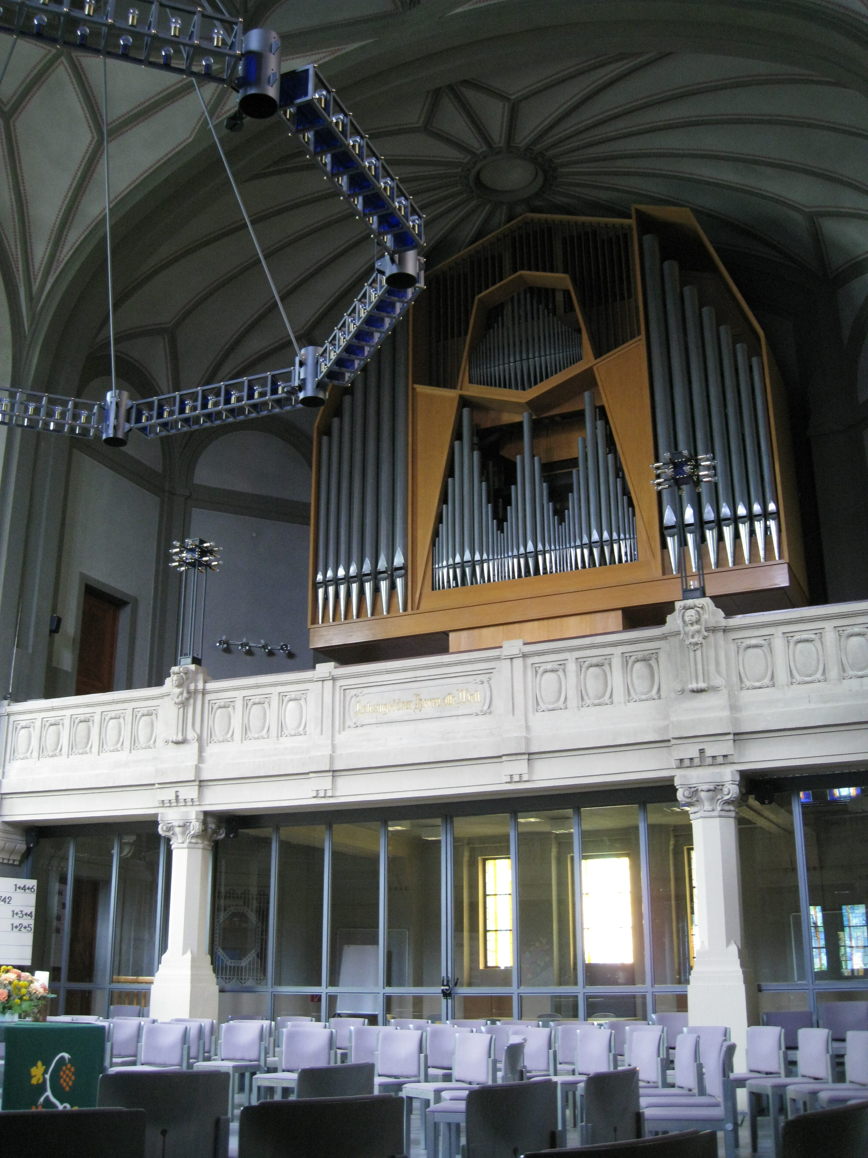 Orgel der Philipp-Melanchthon-Kirche